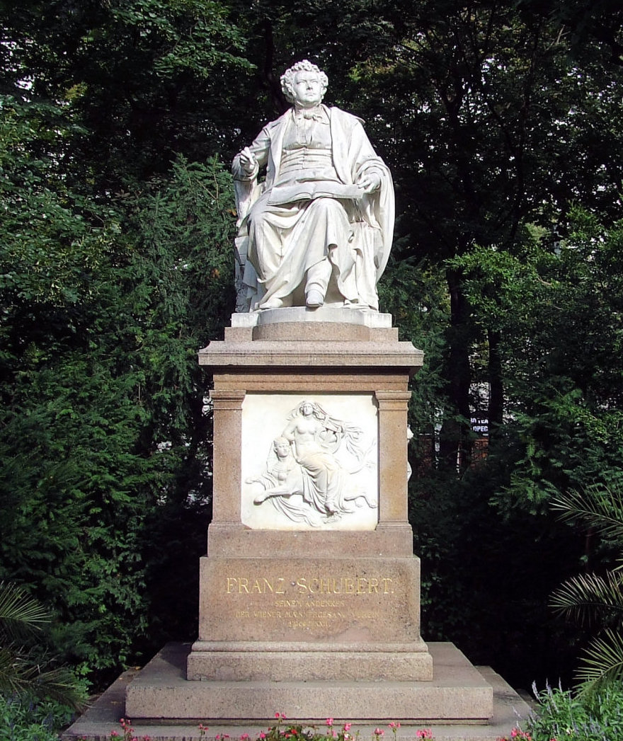 Wien, Stadtpark, Schubert-Denkmal von Carl Kundmann, 1872, Sockel von Theophil von Hansen.